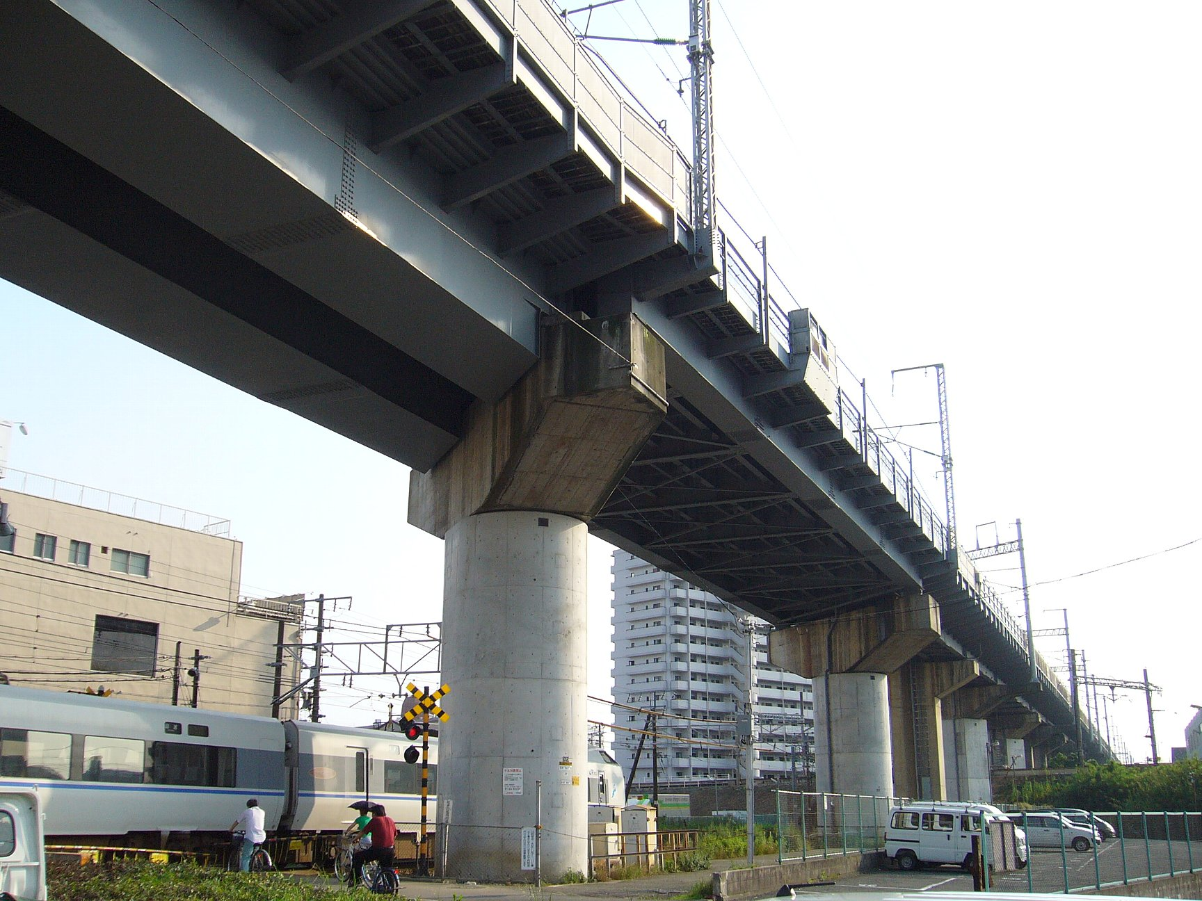 阪急新大阪連絡線の遺構 大阪市淀川区野中南1丁目にて 山陽新幹線（高架）の橋脚の内、手前の2基が斜めに配置されている。奥の盛土高架は阪急宝塚本線、左の踏切は北方貨物線。